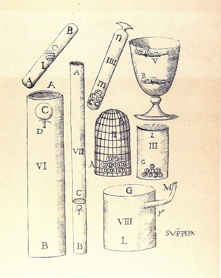 Illustration from Renitenza Certissima dell' Acqua alla Compressione by Raffello Magiotti (1648)